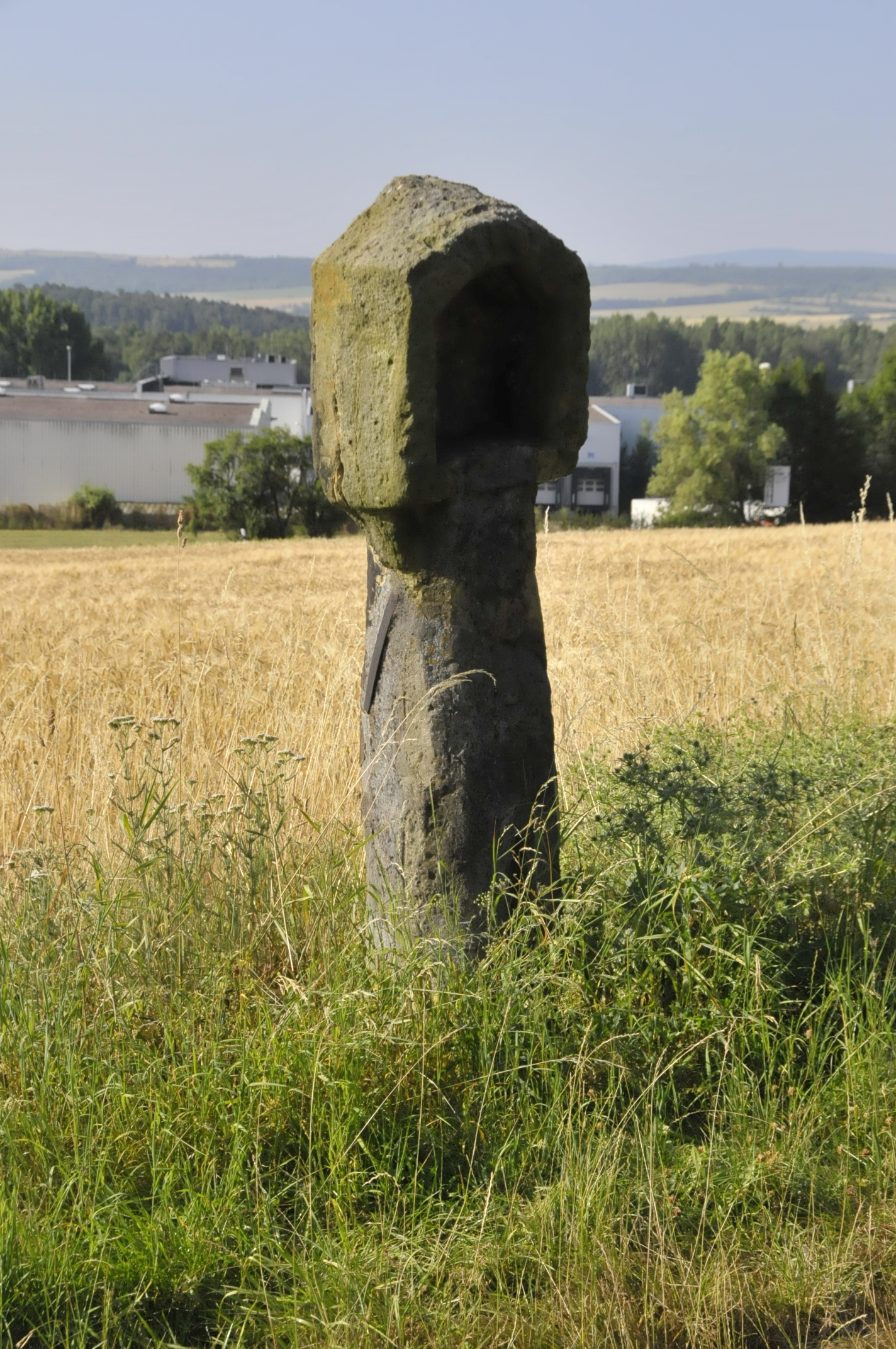 Seebergen, Bildstock an der Weinbergstraße/Am Berg